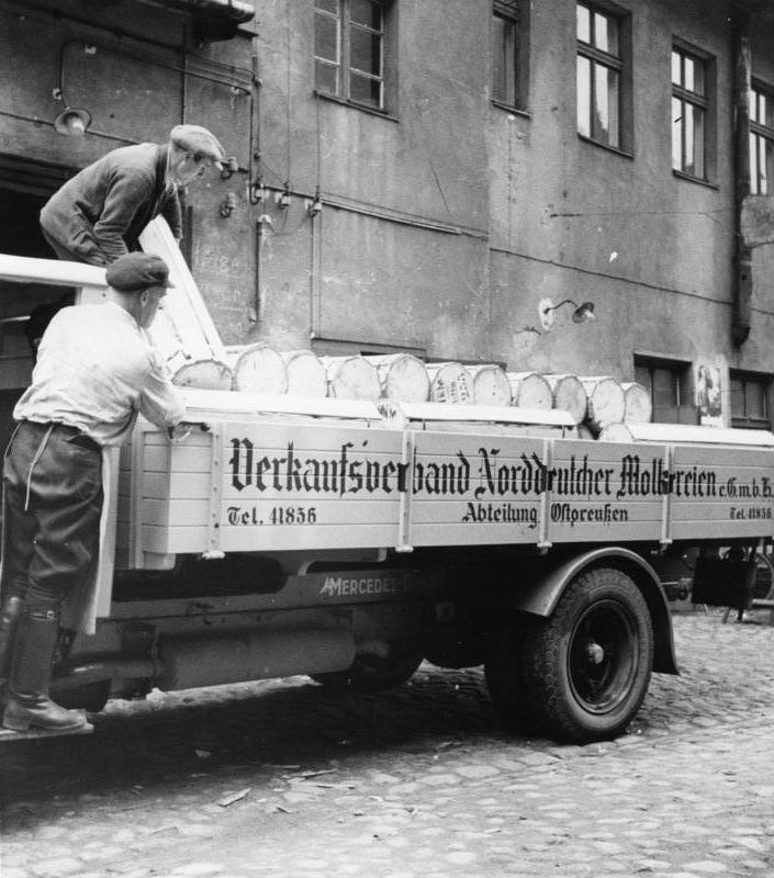 Tilsit (Ostpreußen) Zubereitung von Tilsiterkäse und Versand